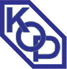 Эмблема футбольного клуба «Казанка»